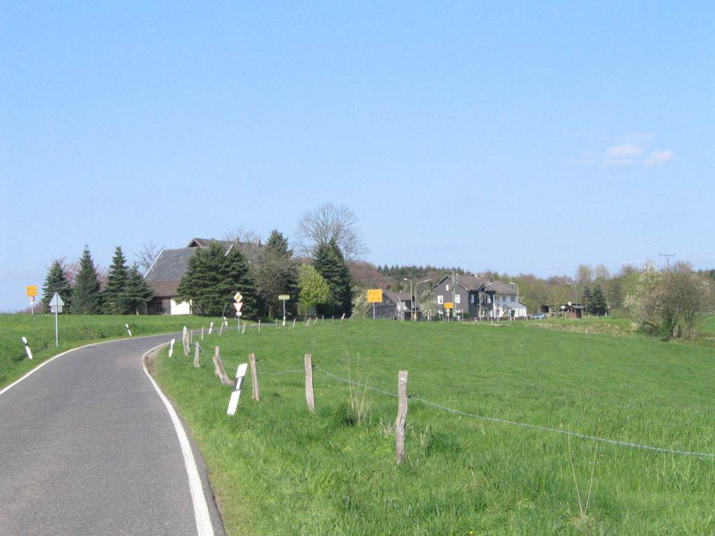 Waldbruch, Ort in Lindlar